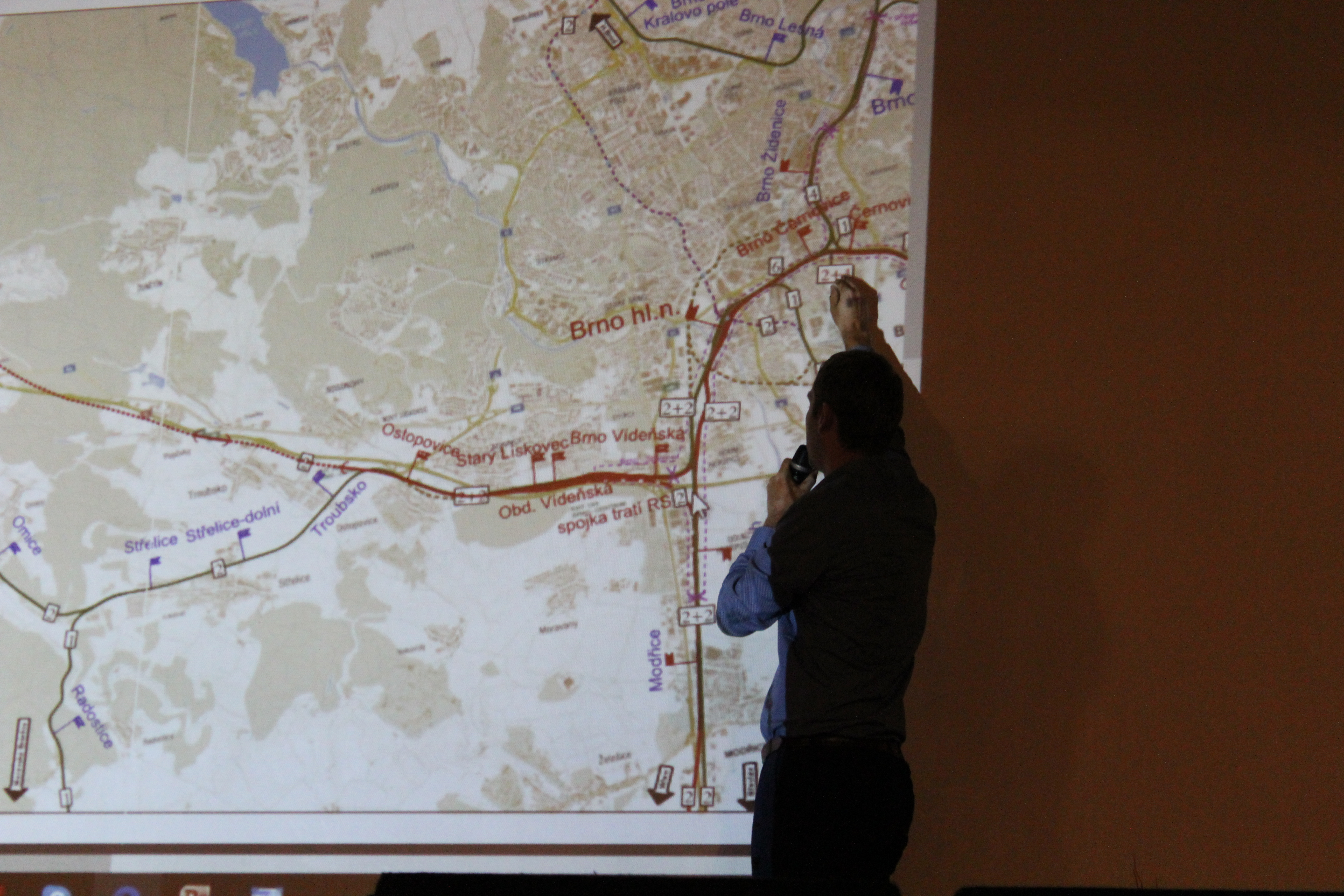 Jundrov veřejná beseda, výklad Ing. Buriánek